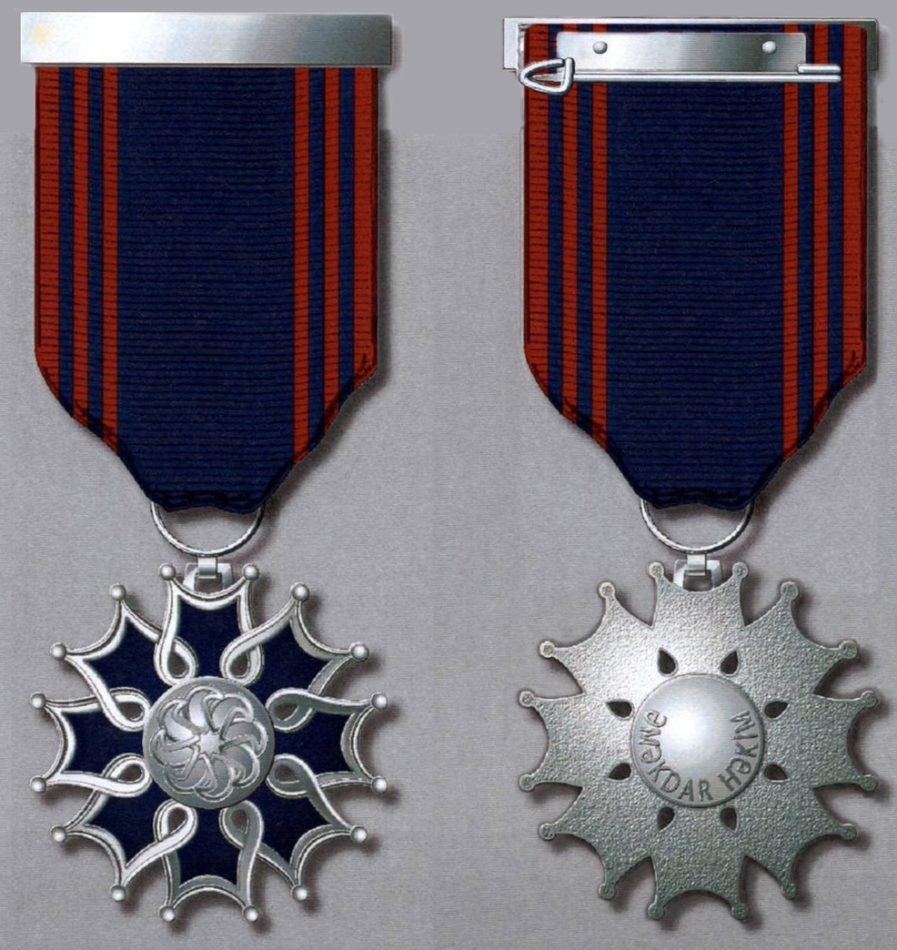 “Əməkdar həkim” fəxri adının döş nişanı